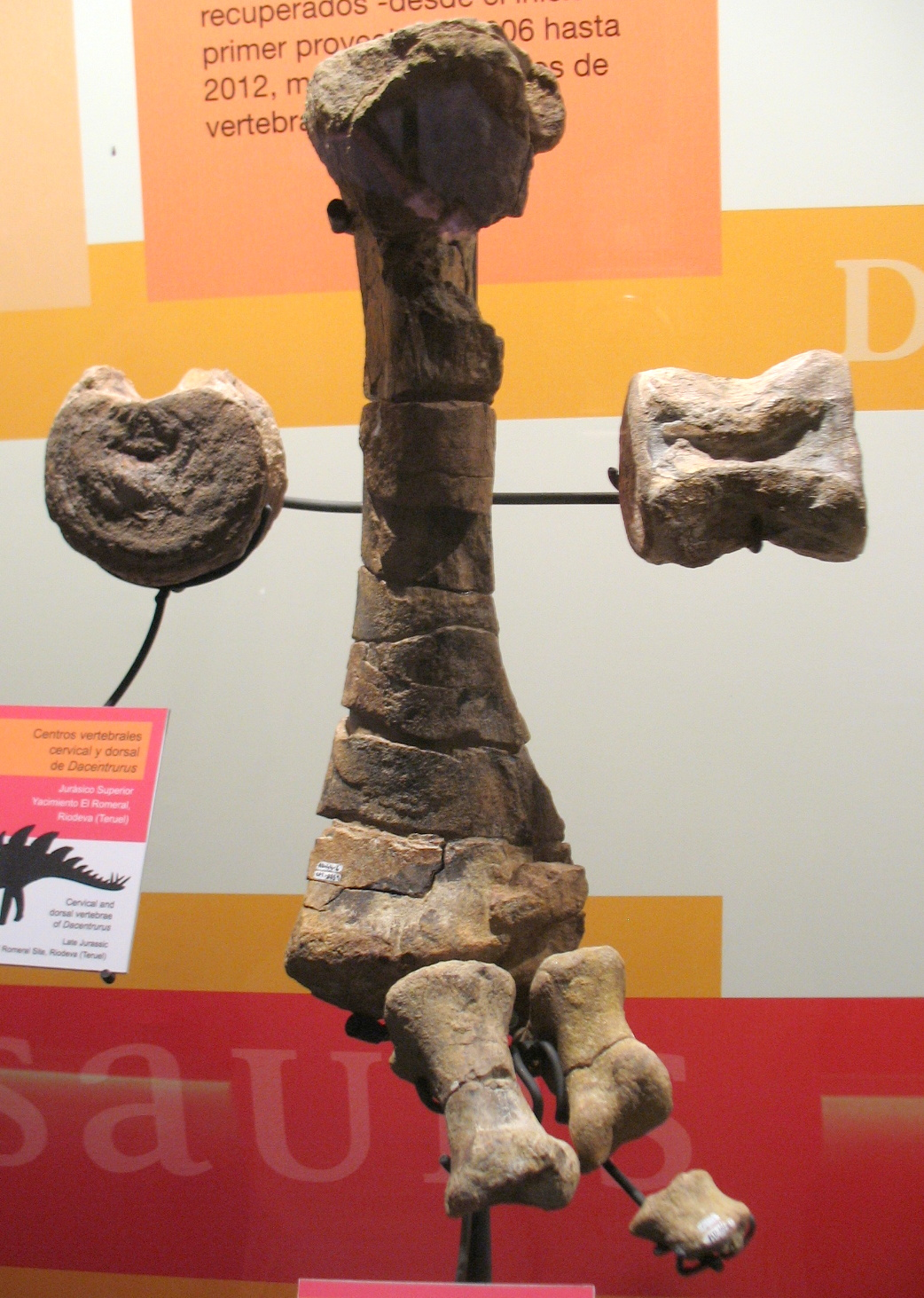 Tibia y metatarsales de Dacentrurus. Yacimiento La Quineta 2 (Riodeva, Teruel, España). Expuesto en el museo paleontológico de Dinópolis.